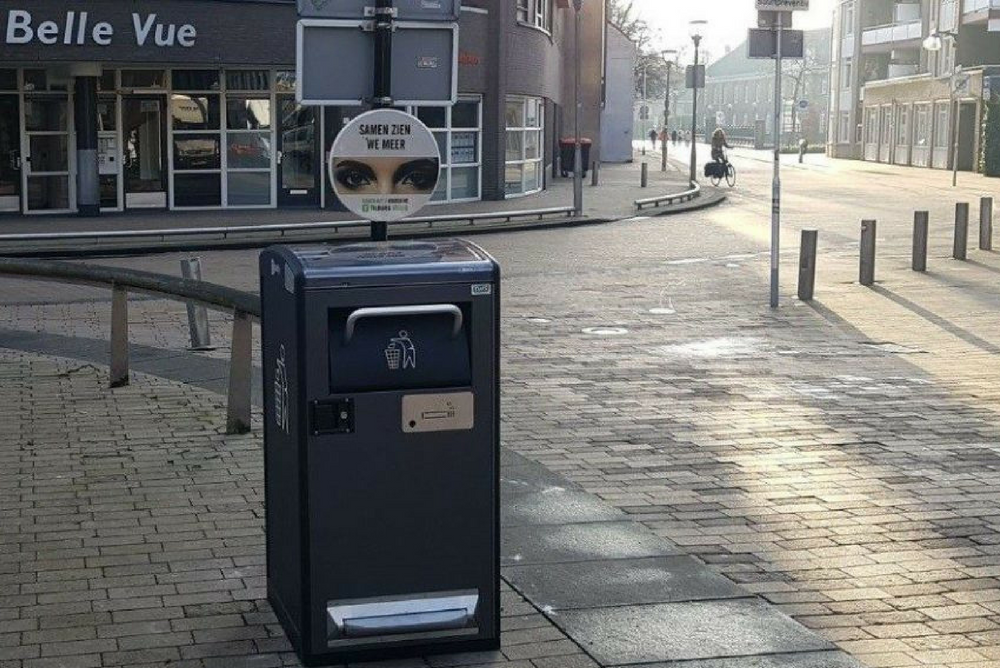 Een Big Belly container in Tilburg